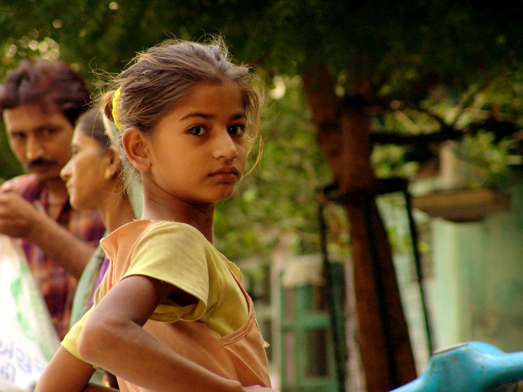 Indian girl